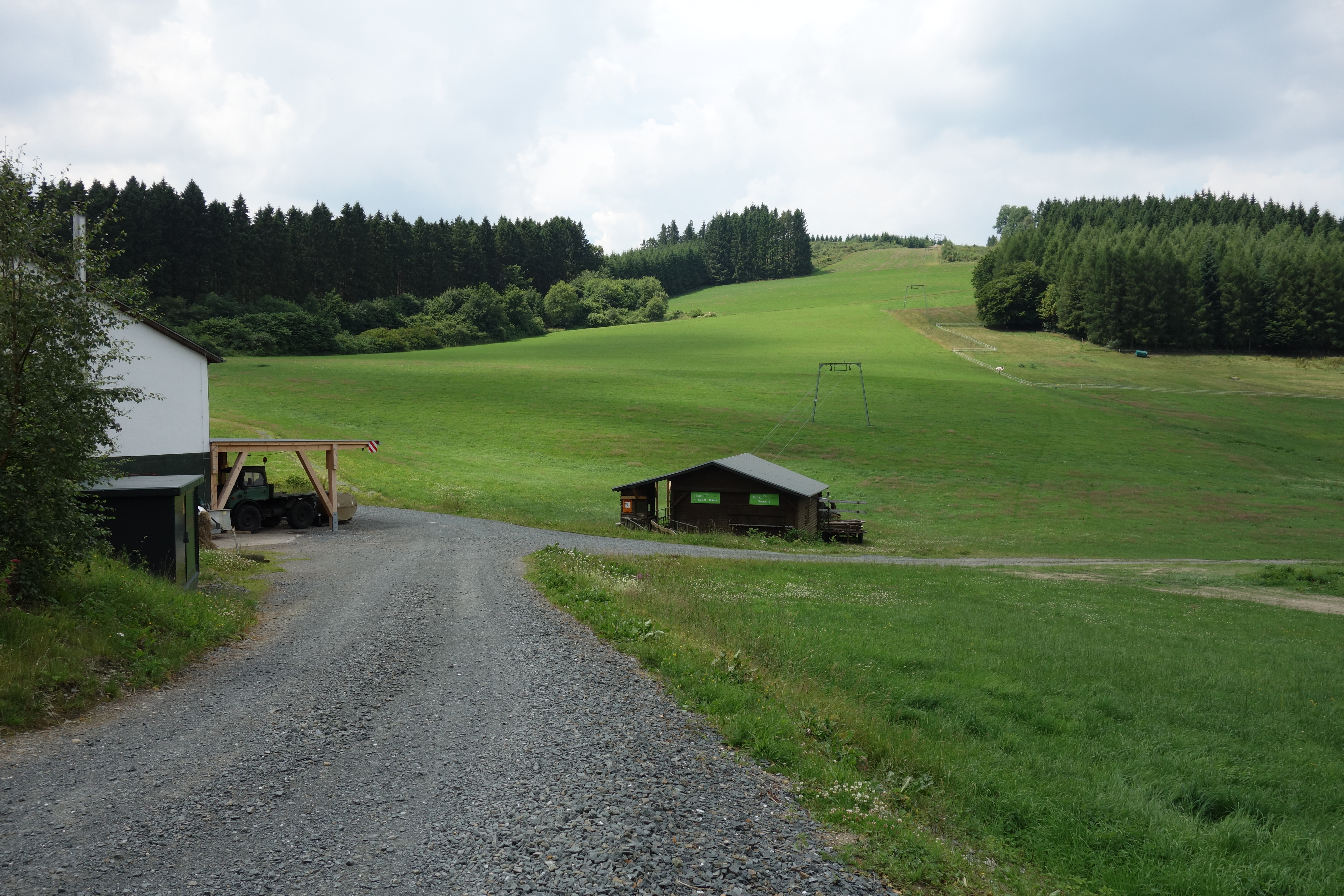 Landschaftsschutzgebiet Offenlandbereich Rimberg mit Skilift von Süden. Wald gehört zum Landschaftsschutzgebiet Schmallenberg-Nordwest.